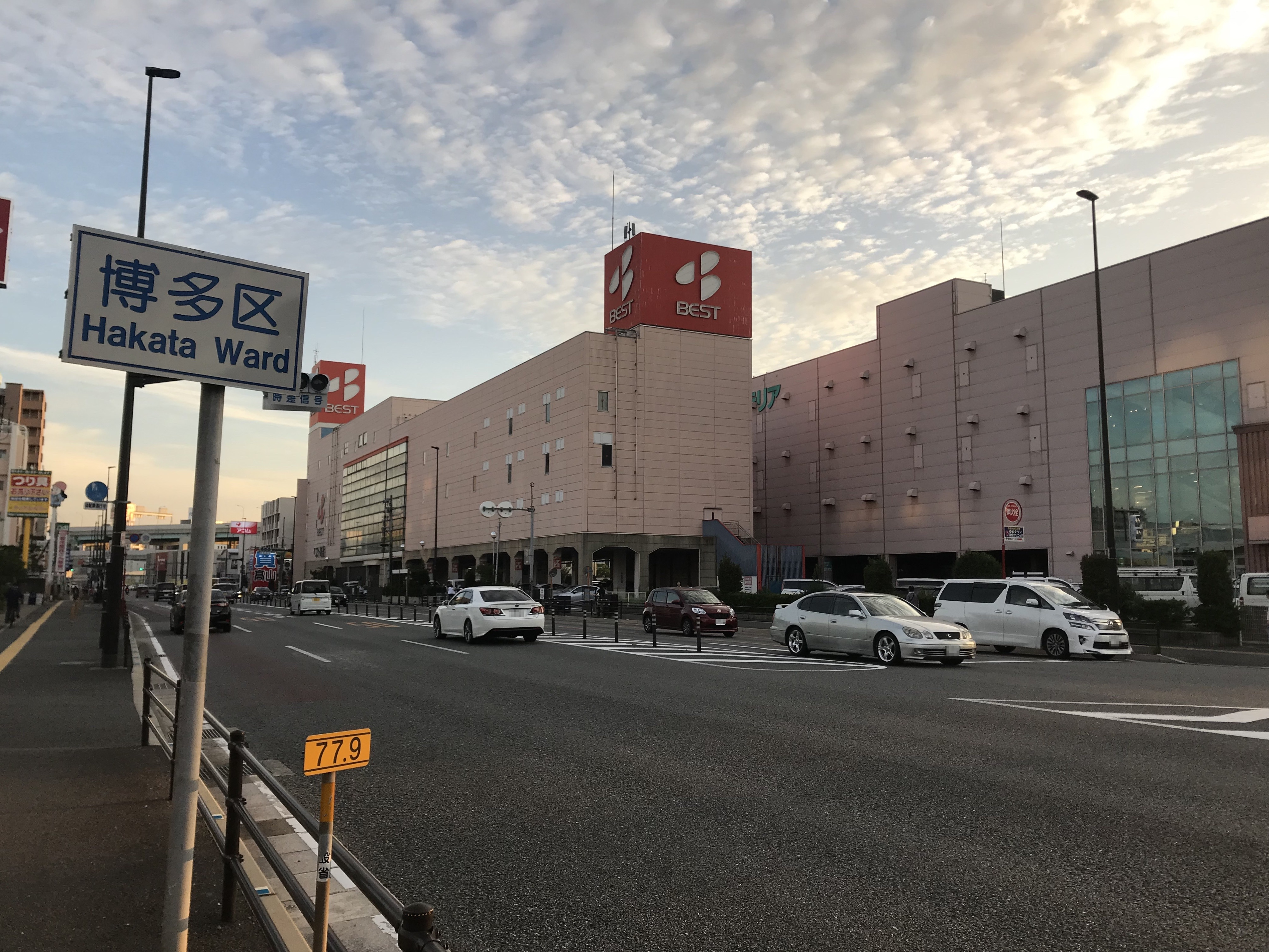 国道3号とベスト電器本社